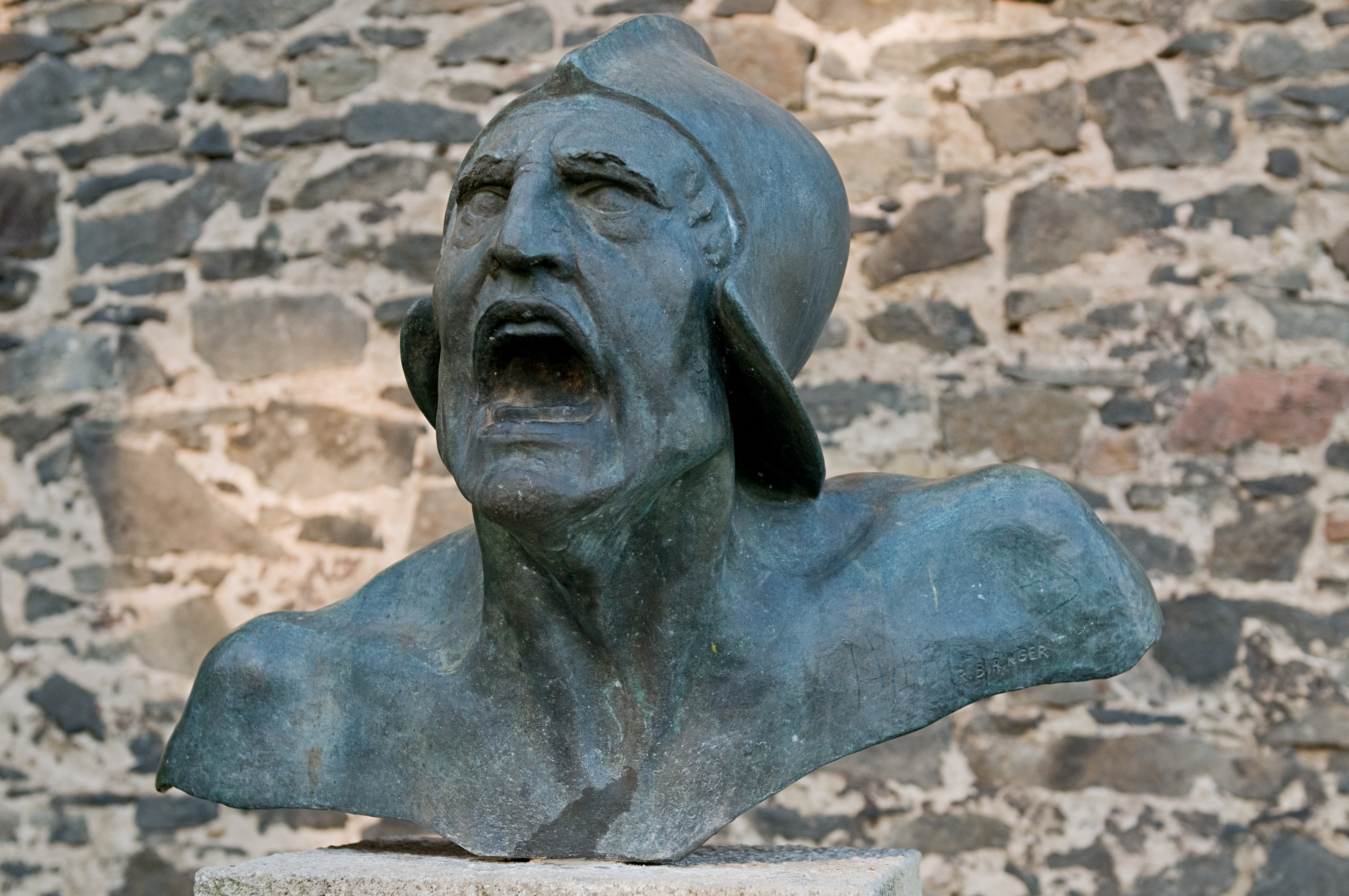 Bronzeplastik „Krieg“ von Richard Biringer in Frankfurt-Höchst Frontalansicht der Büste